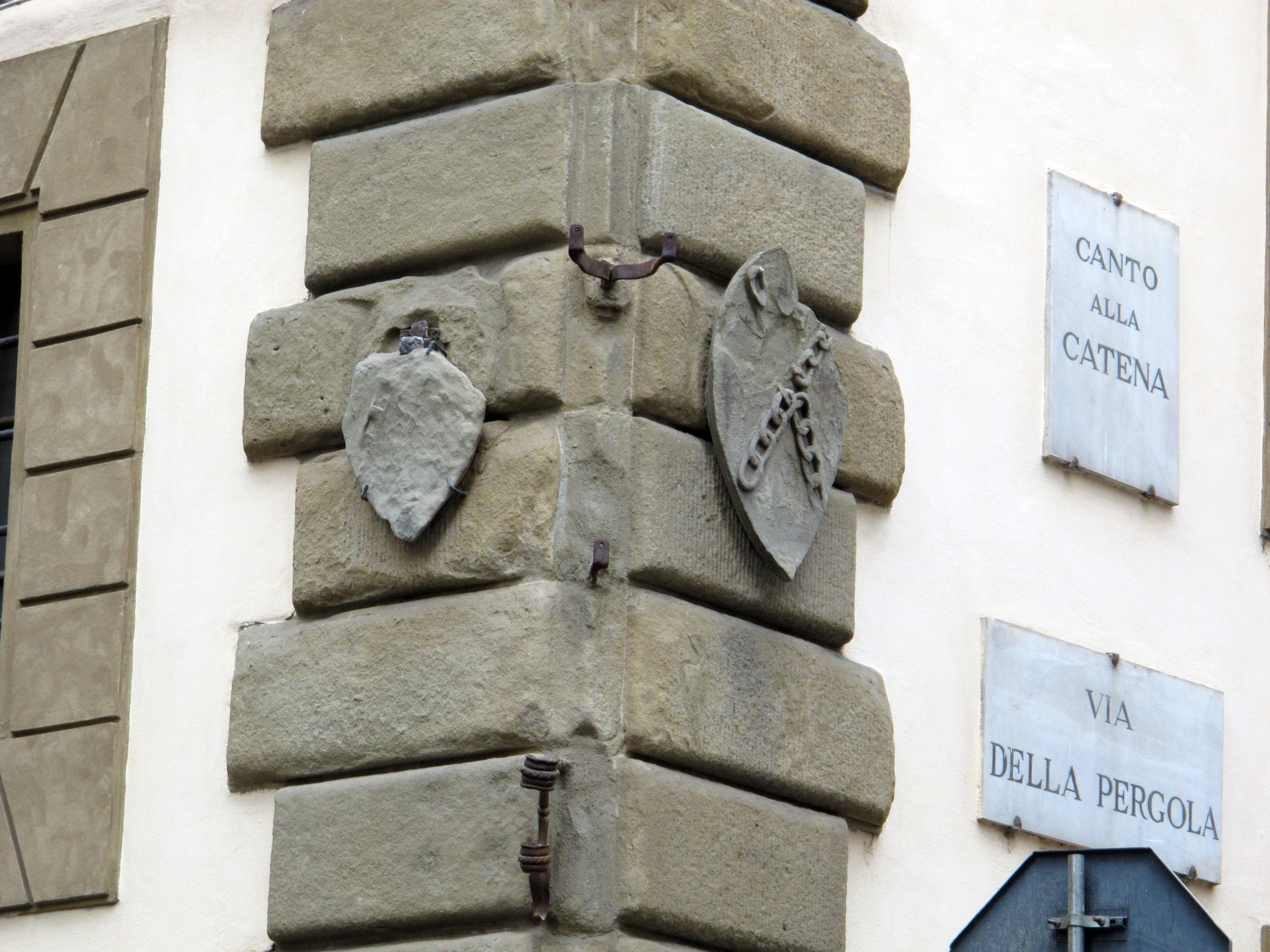 Via della Pergola, Firenze